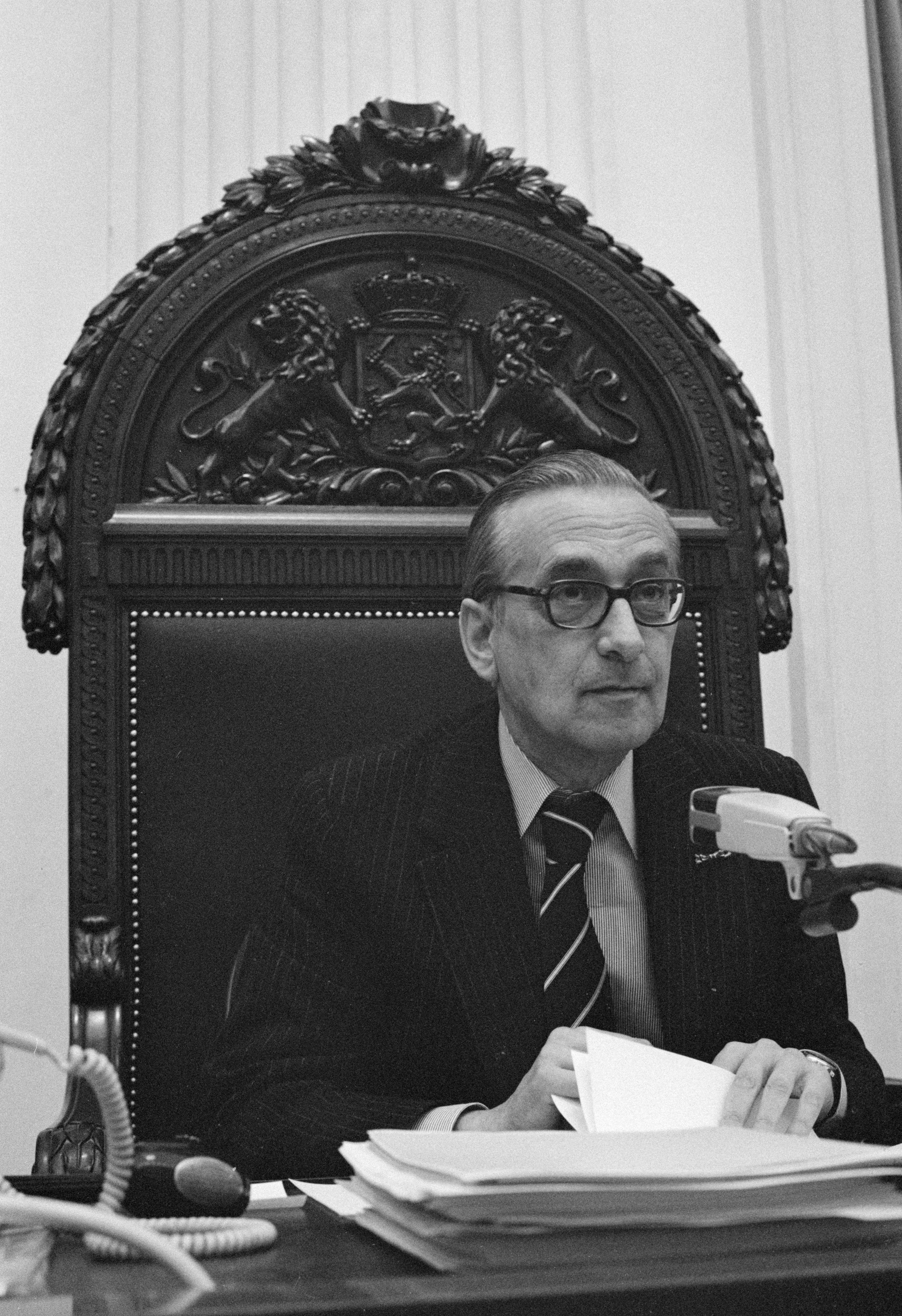 Nationaal Archief Beschrijving: vice-kamervoorzitter Joekes (VVD) Datum: 15 oktober 1980 Bestanddeelnummer NL-HaNA_Anefo_931-0878 Vervaardiger: Anefo / Dijk, H. van URL: Voor meer informatie over het Nationaal Archief: Voor meer foto's uit deze en andere collecties, bezoek onze Beeldbank:, U kunt ons helpen onze kennis van de fotocollecties te verrijken door tags en commentaren toe te voegen. Herkent u mensen of locaties of heeft u een bijzonder verhaal te vertellen bij één van de foto's, laat dan een reactie achter (als u ingelogd bent bij Flickr) of stuur een mailtje naar